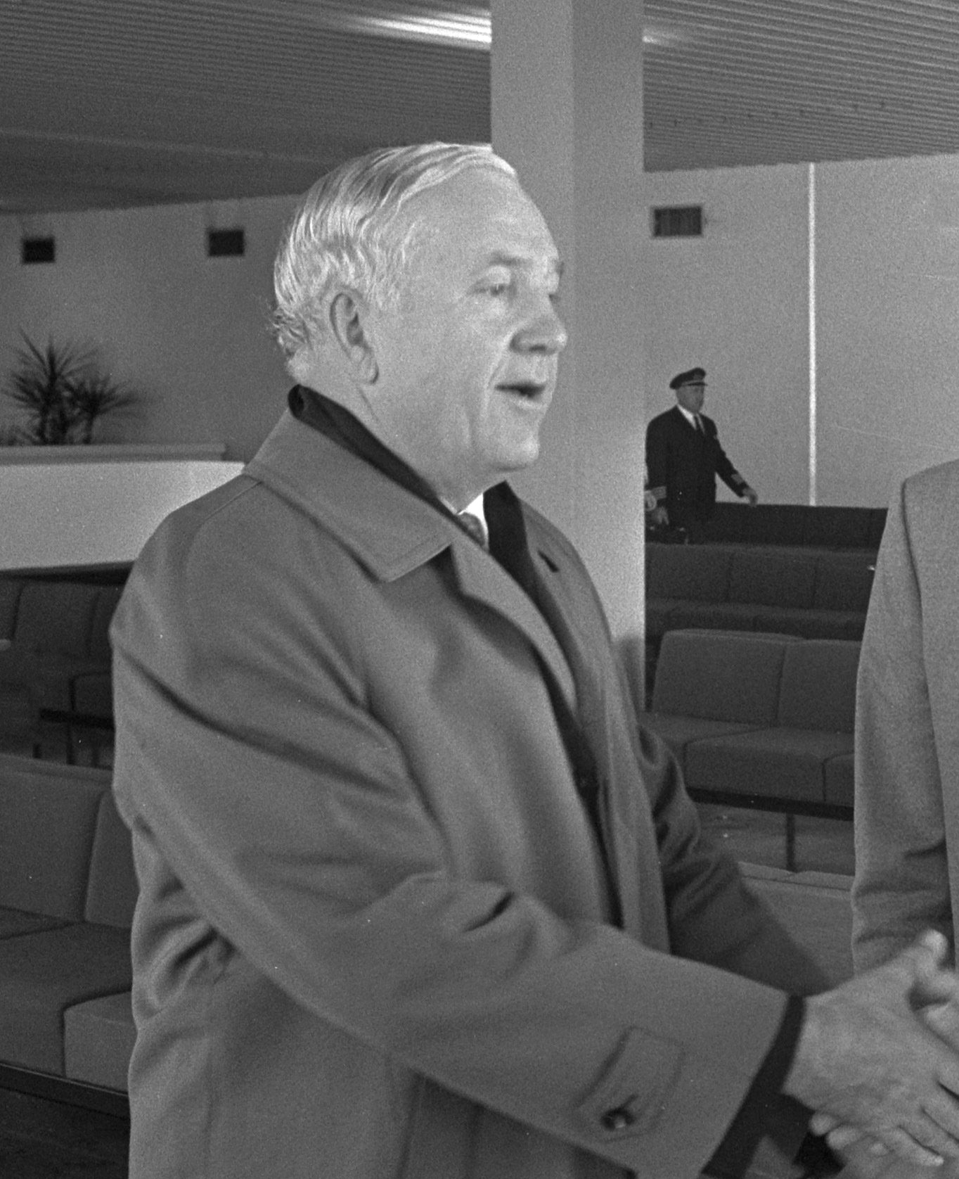 Burgemeester Thomassen van Rotterdam vertrekt van Schiphol naar Leningrad, de Russische ambassadeur Romanov (links) en echtpaar Thomassen